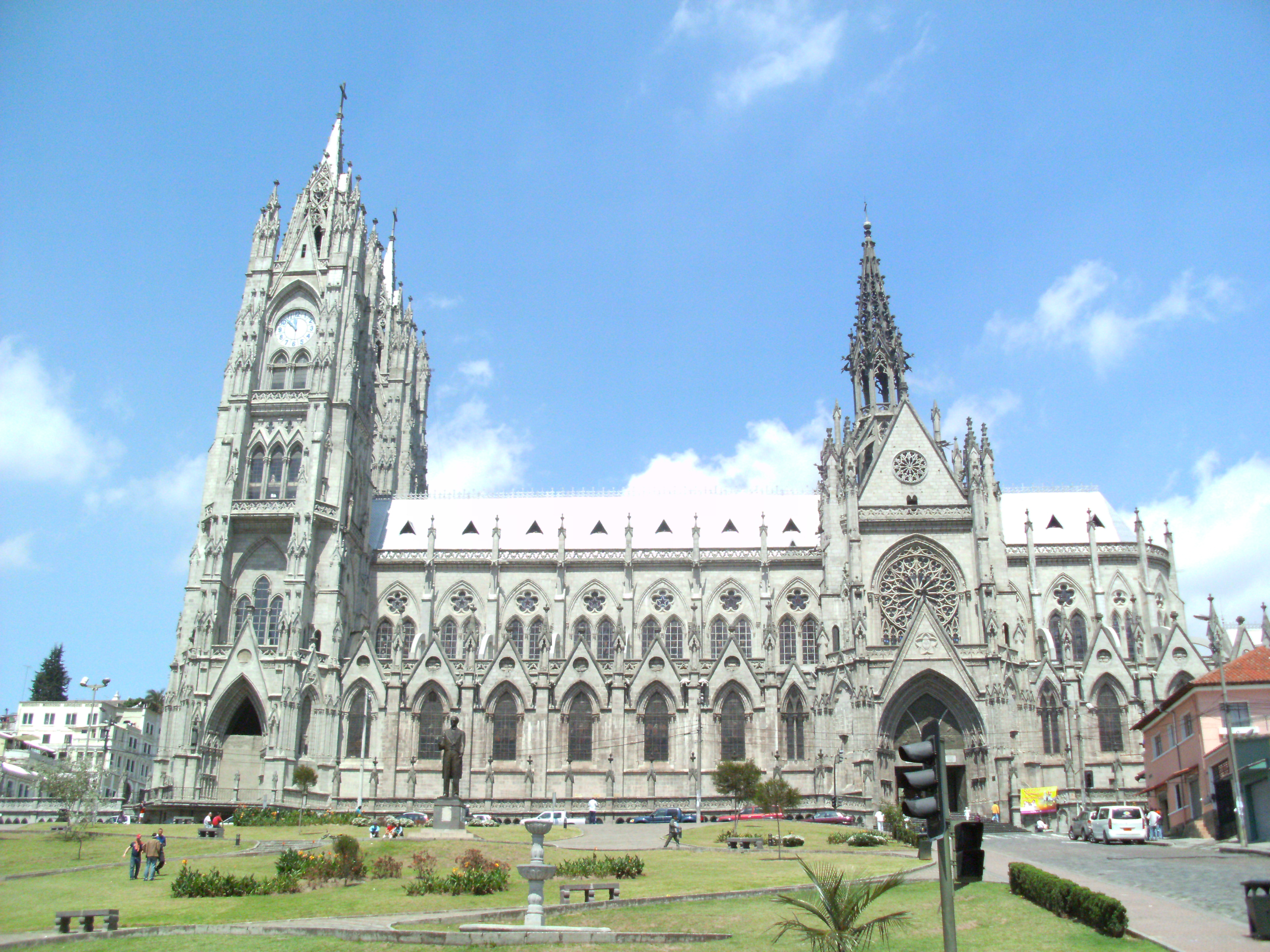 Majestuosa La Basílica del Voto Nacional de Quito vista desde el parque.